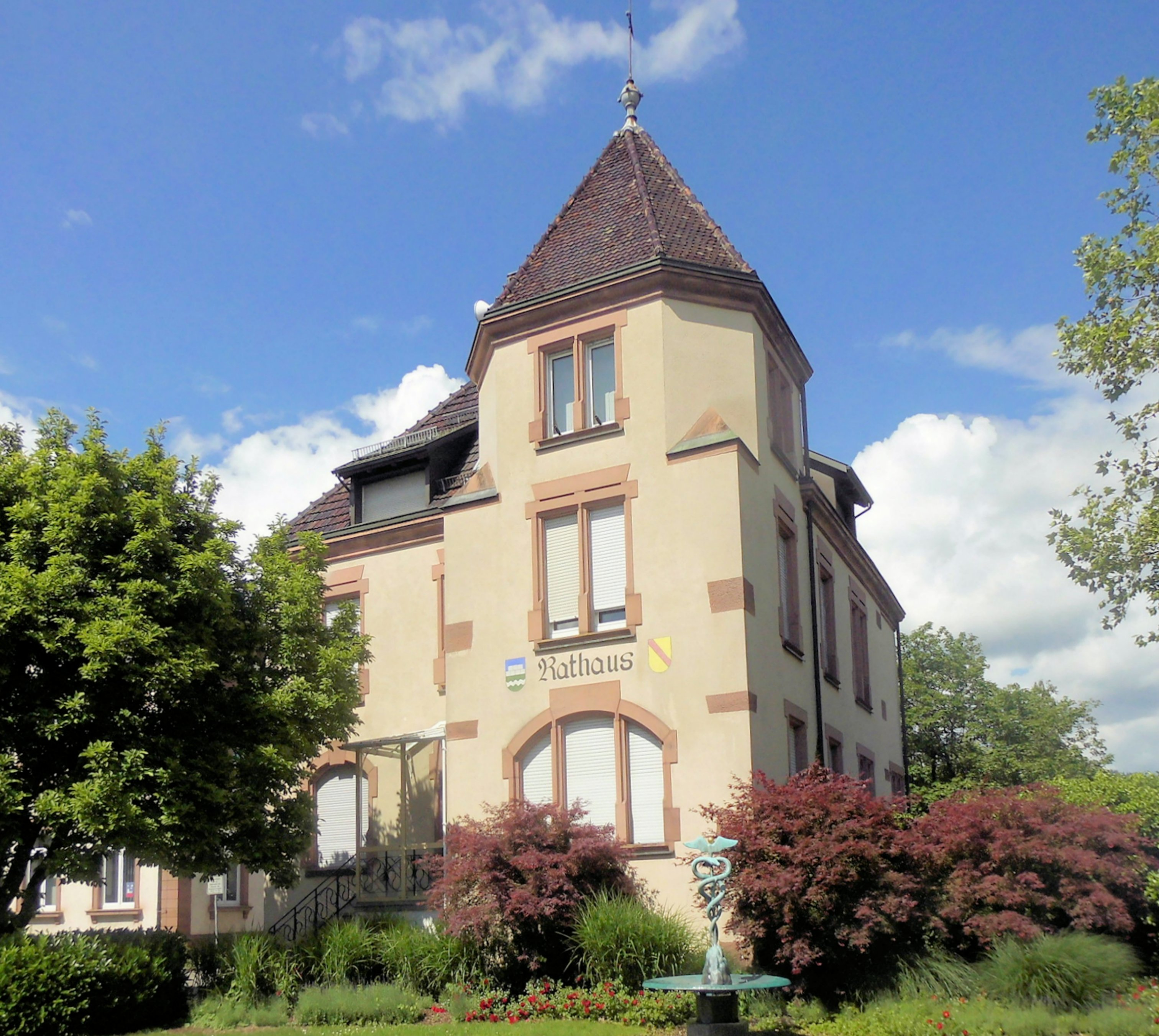 Rathaus der Gemeinde Steinen, Landkreis Lörrach